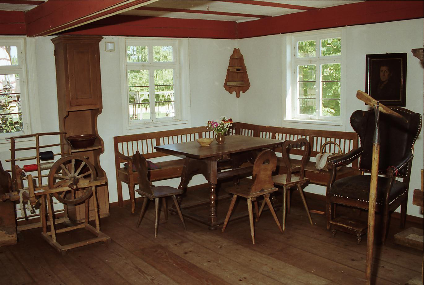 Bauernstube im Wohn-Stall-Haus aus Elzhausen im Freilandmuseum Wackershofen